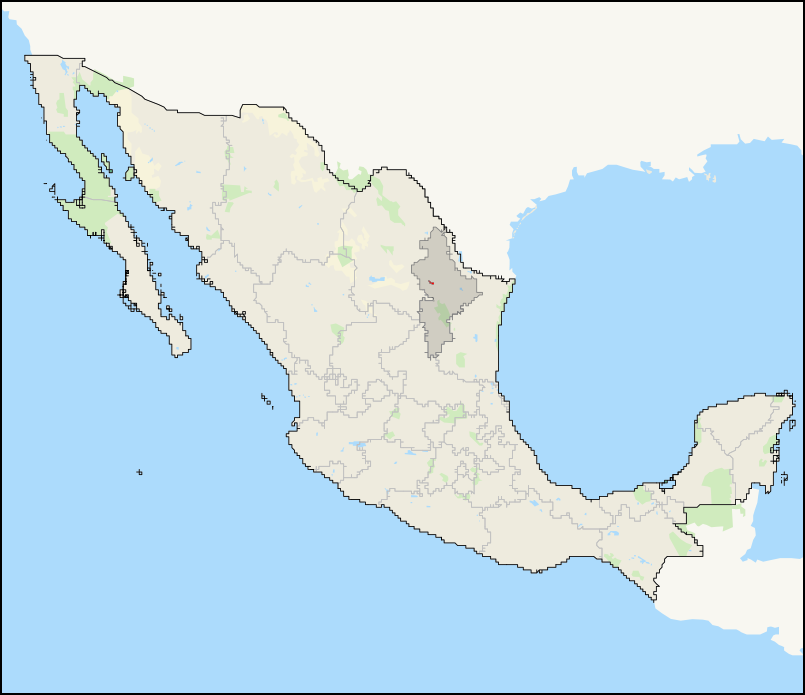 Mapa del distrito electoral federal 3 de Nuevo León ubicado en México